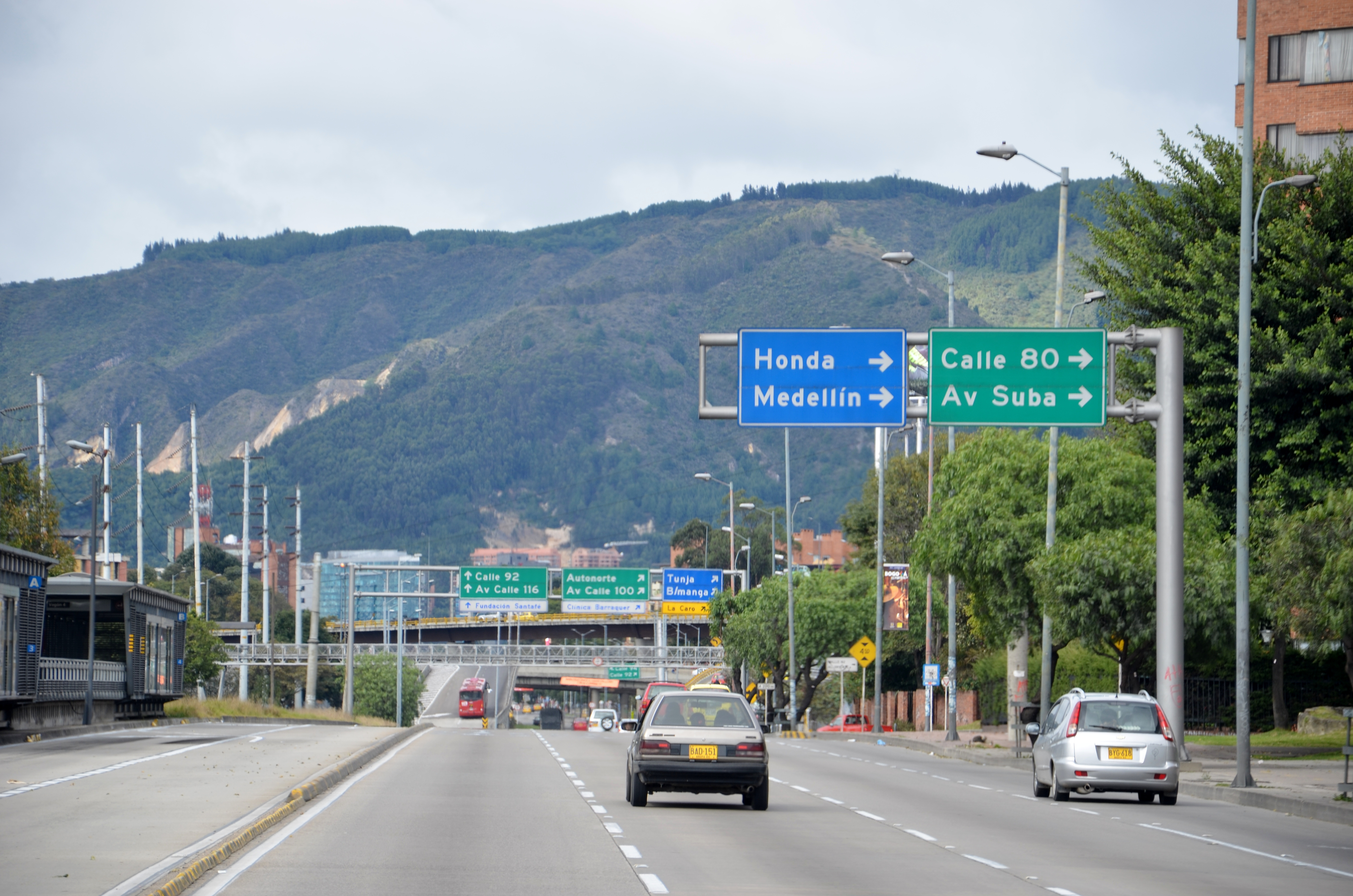 Bogotá en el 2011